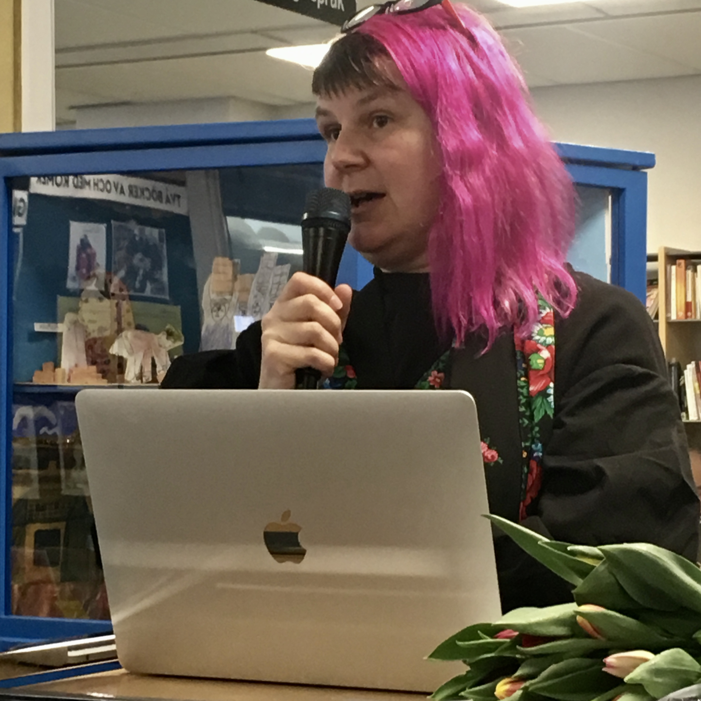 Förläggaren Arina Stoenescu talar vid en presentation på Rinkeby bibliotek